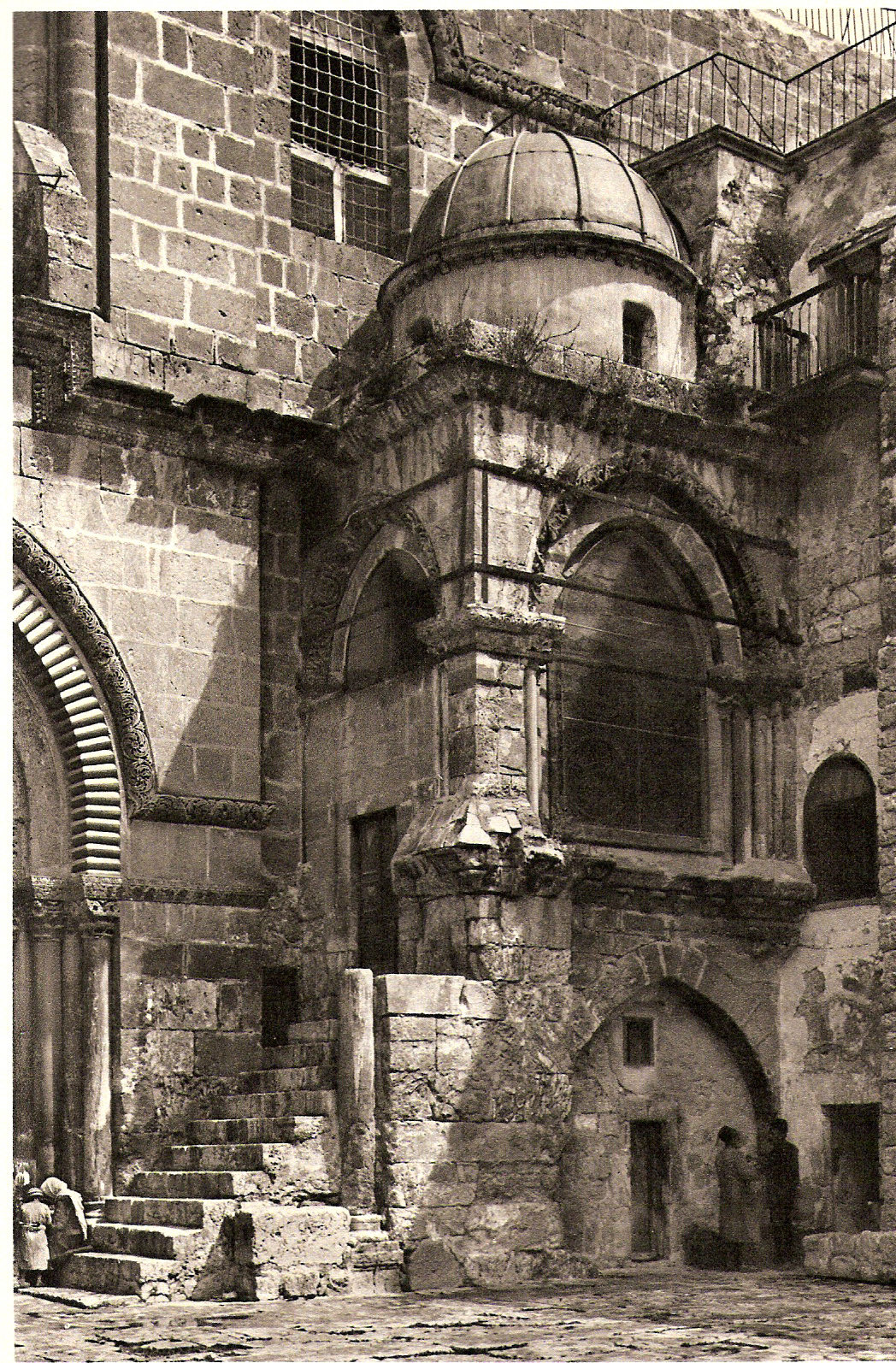 chapelle de l'Agonie de la Vierge